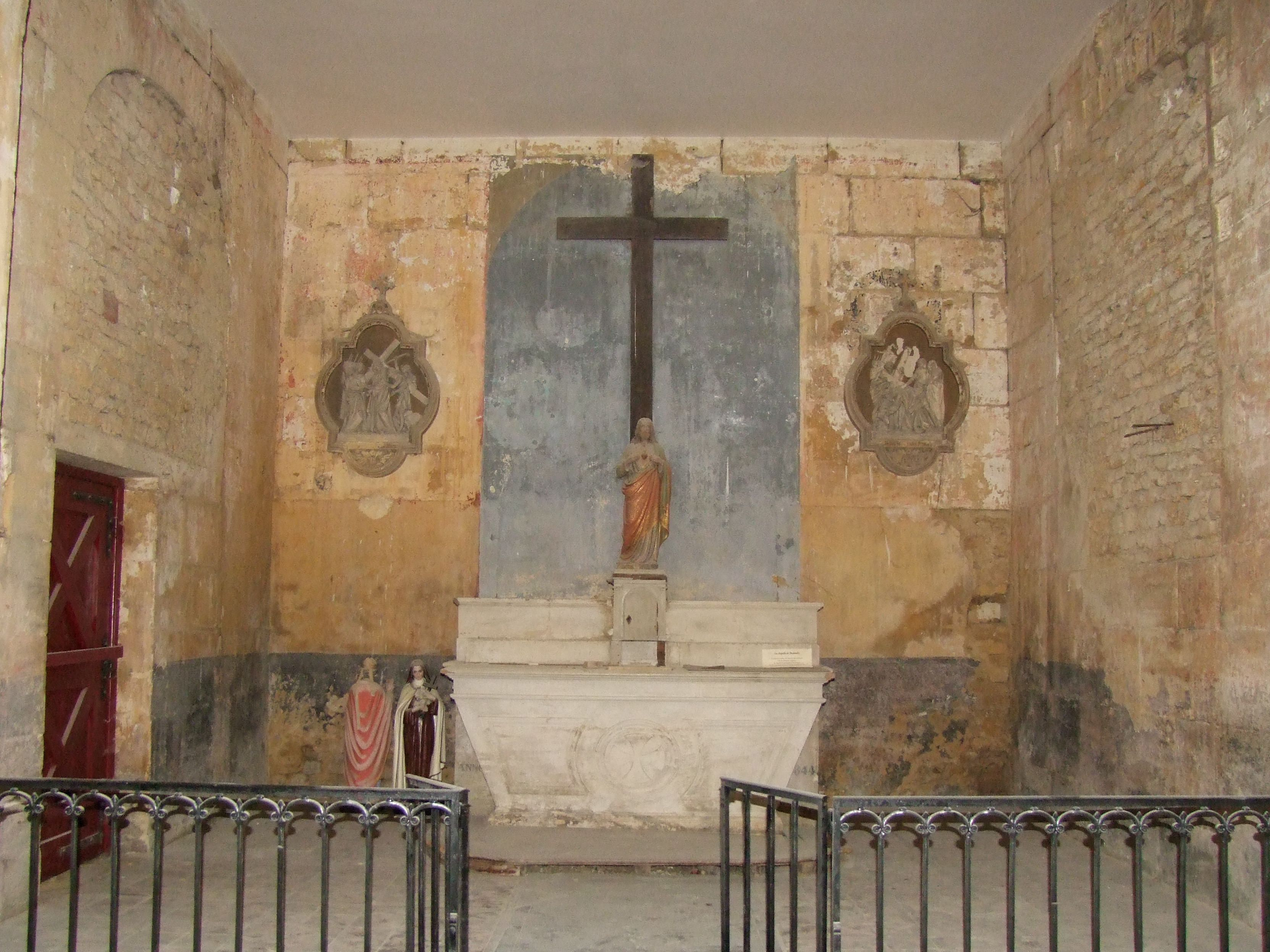 Chapelle Malandry, dans l'église Saint-Martin de Montmédy, Meuse, France